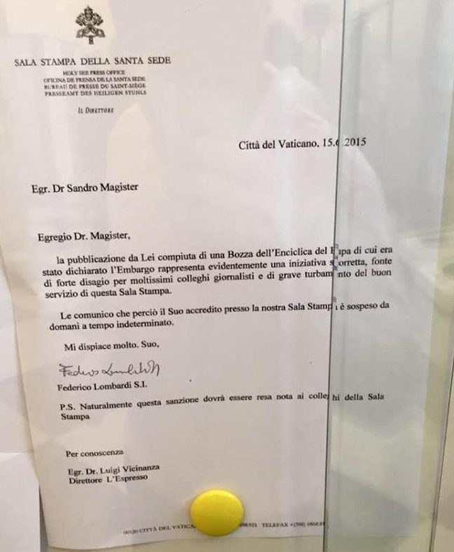 Sandro Magister lettera di sospensione dalla Sala Stampa Vaticana a firma del direttore padre Federico Lombardi